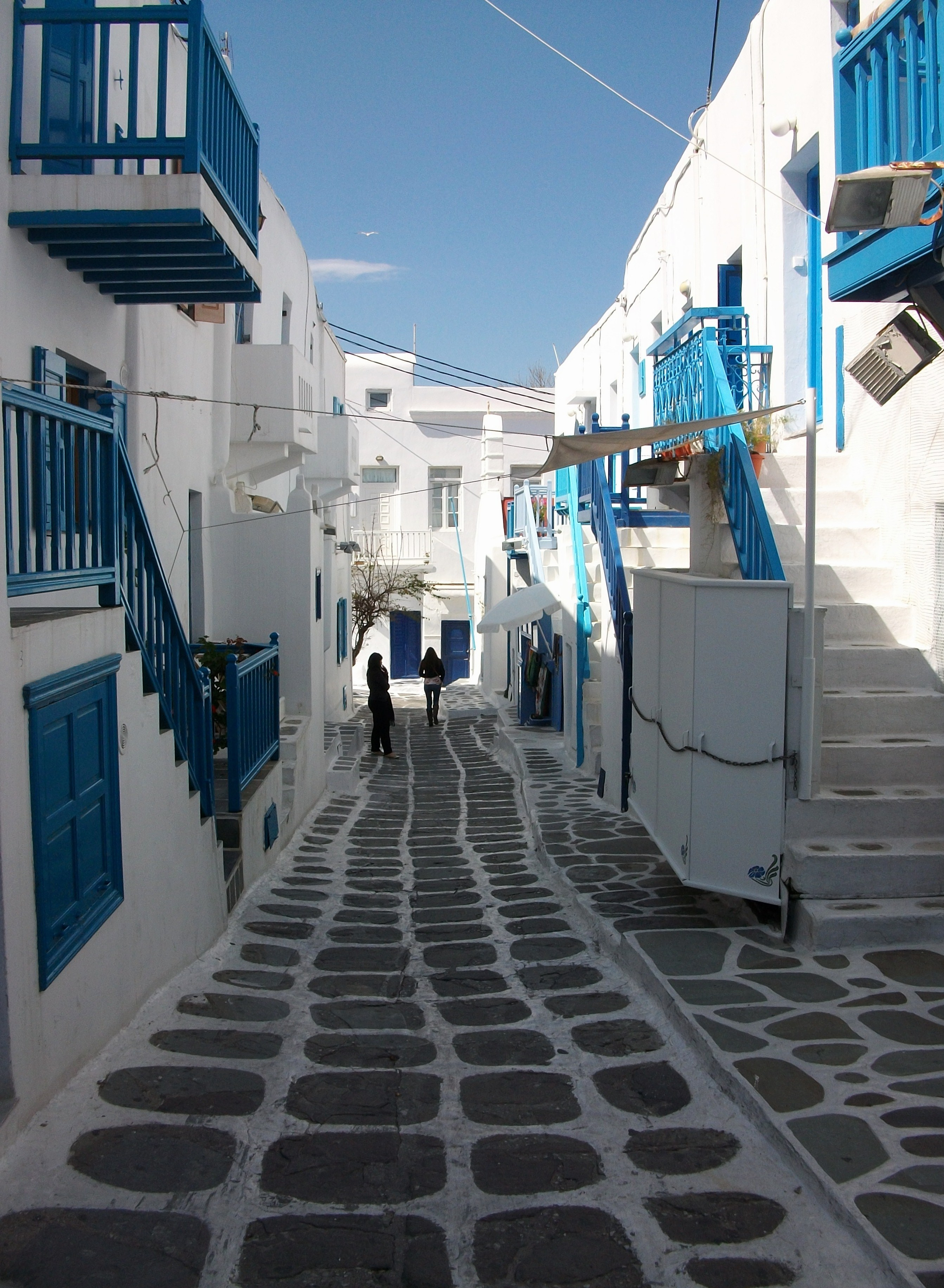 Carrer de Míkonos.